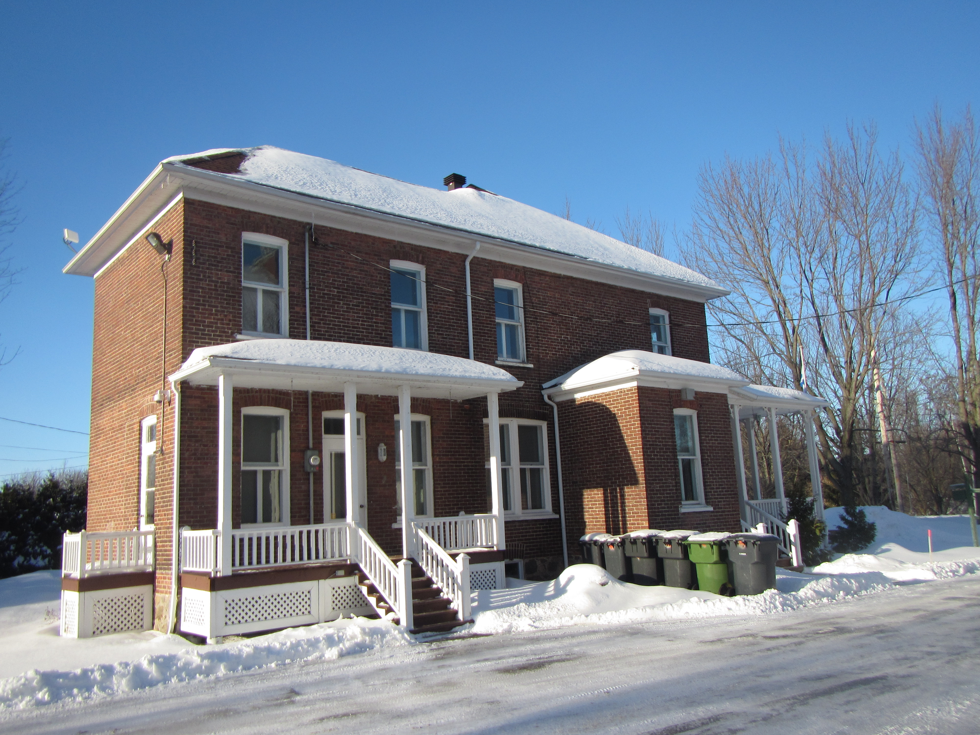 Ancien presbytère de Saint-Edmond-de-Grantham, Québec.